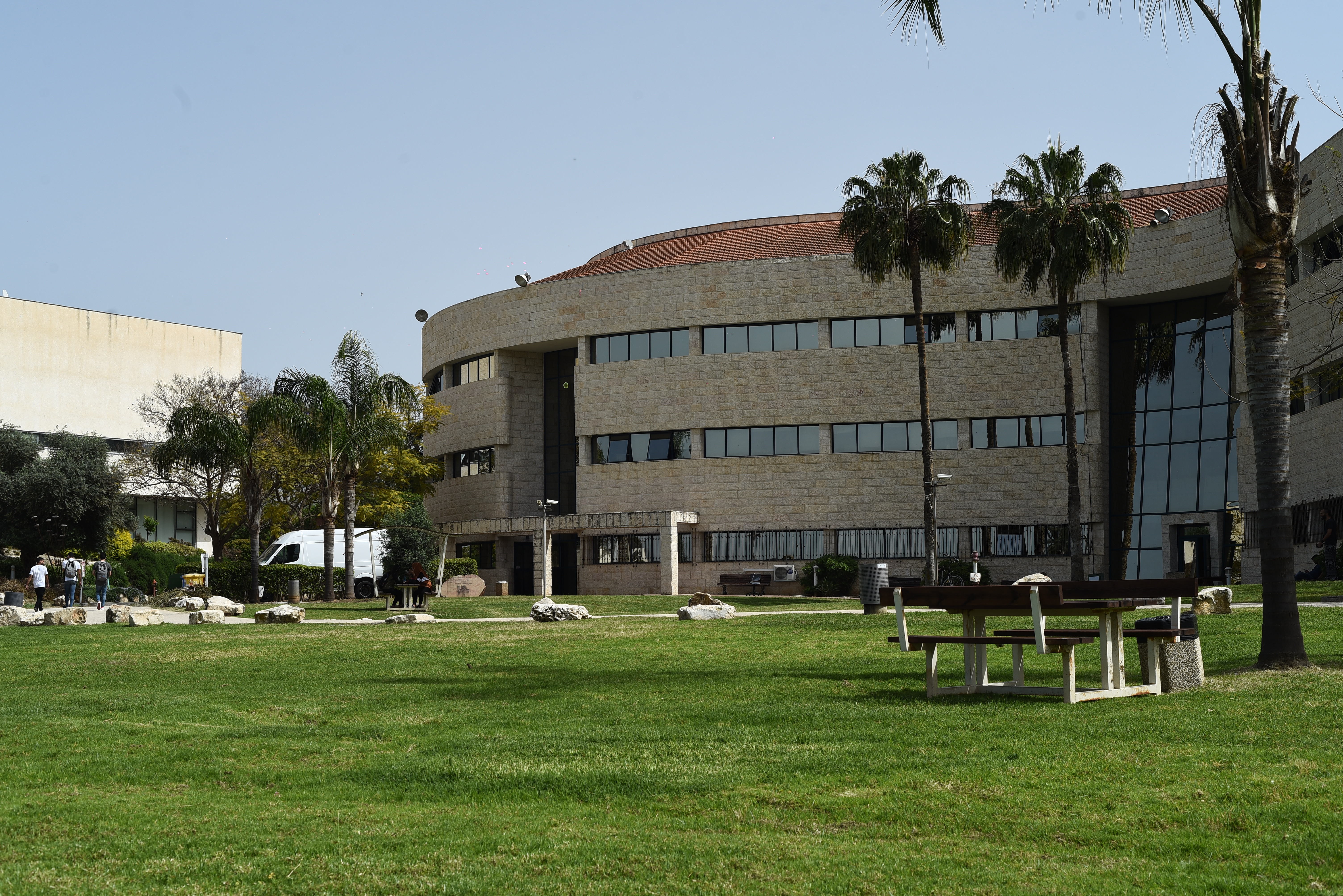 المبنى المتوسط للكلية